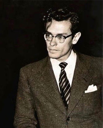 Abelardo Oquendo en los años 50's